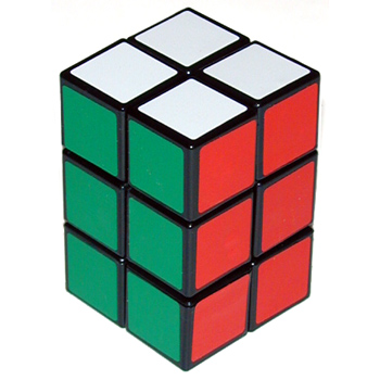 Parallelepipedo il quale 2 dimensioni hanno 2 cubetti ed una sola 3